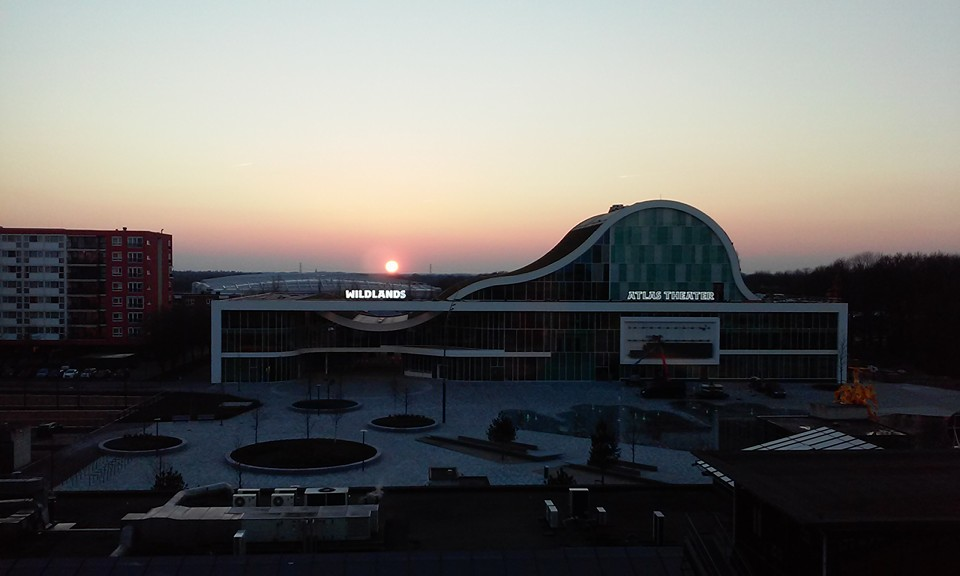 Atlas Theater